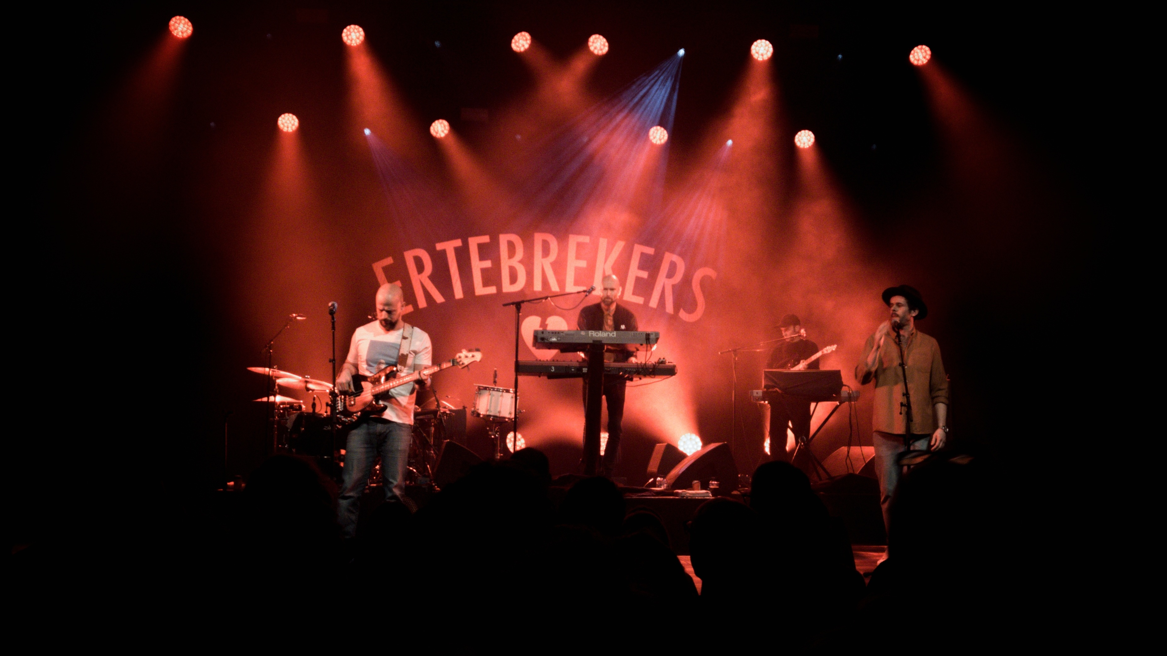 Ertebrekers